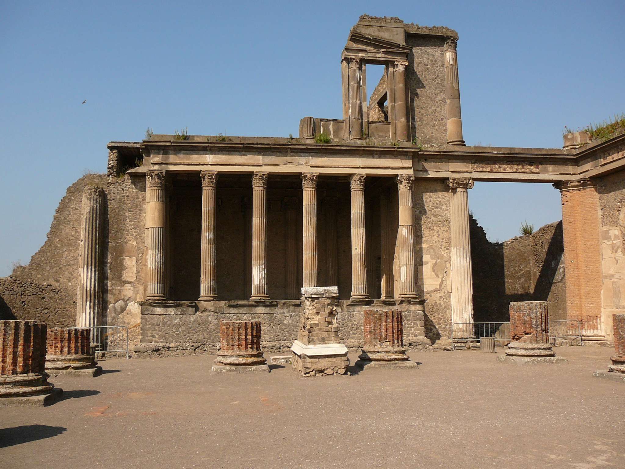 Pompei - Italy